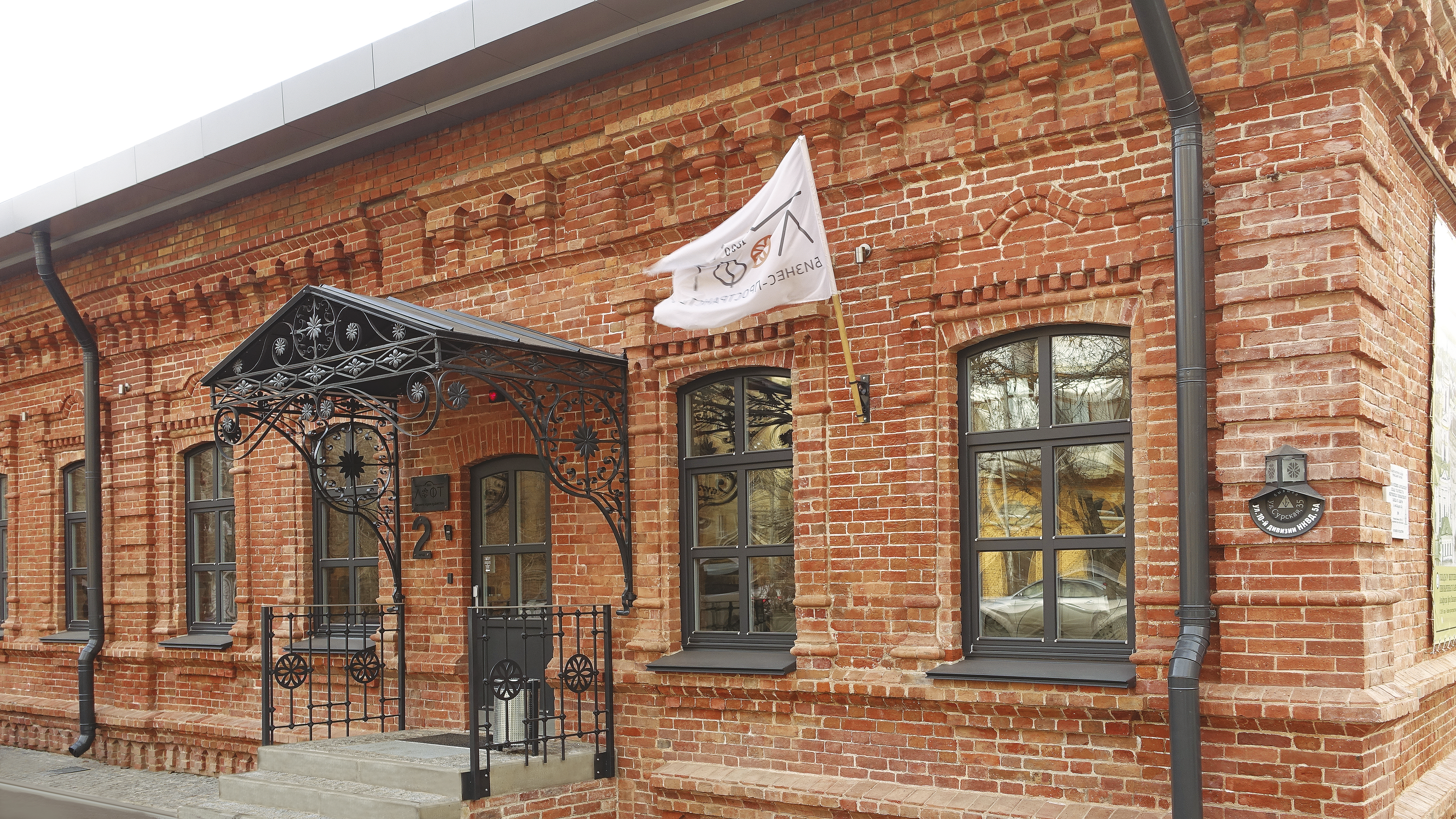 Контора Царицынского склада Товарищества Жигулевского пивоваренного завода А.Вакано и Ко (ЛОФТ1890) после реставрации.